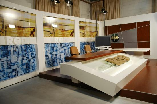 Estudios de Red Informativa en 2010. El noticiero de La Red.